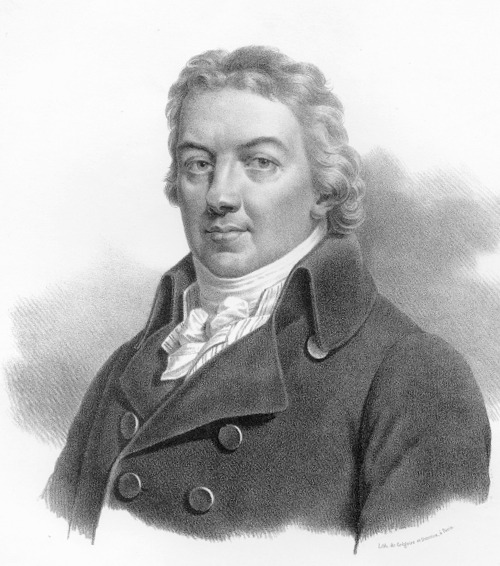 Edward Jenner (1749-1823)